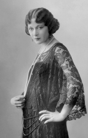 Valia